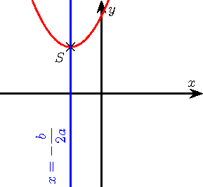 Parabole dans le cas et